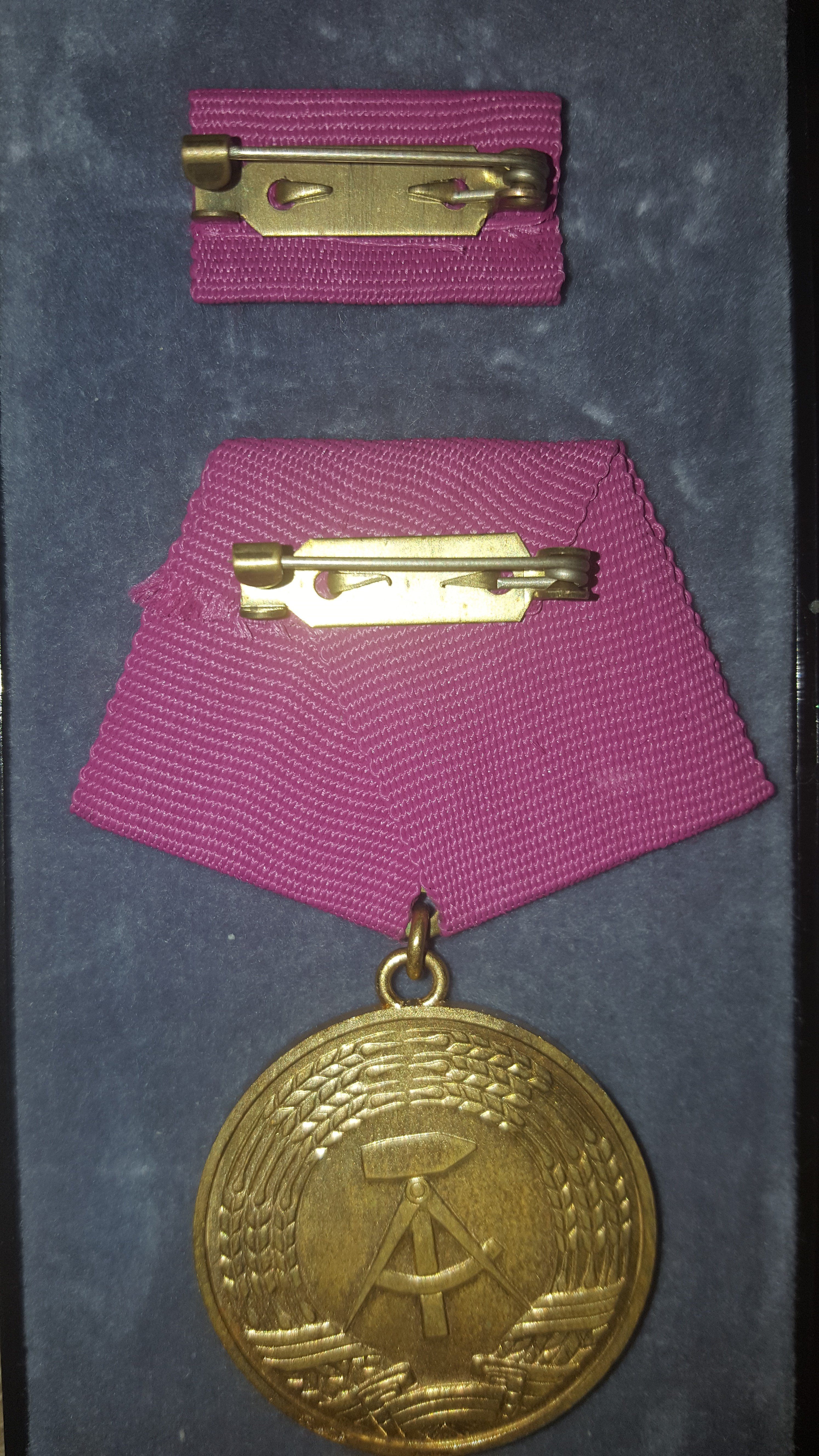 médaille